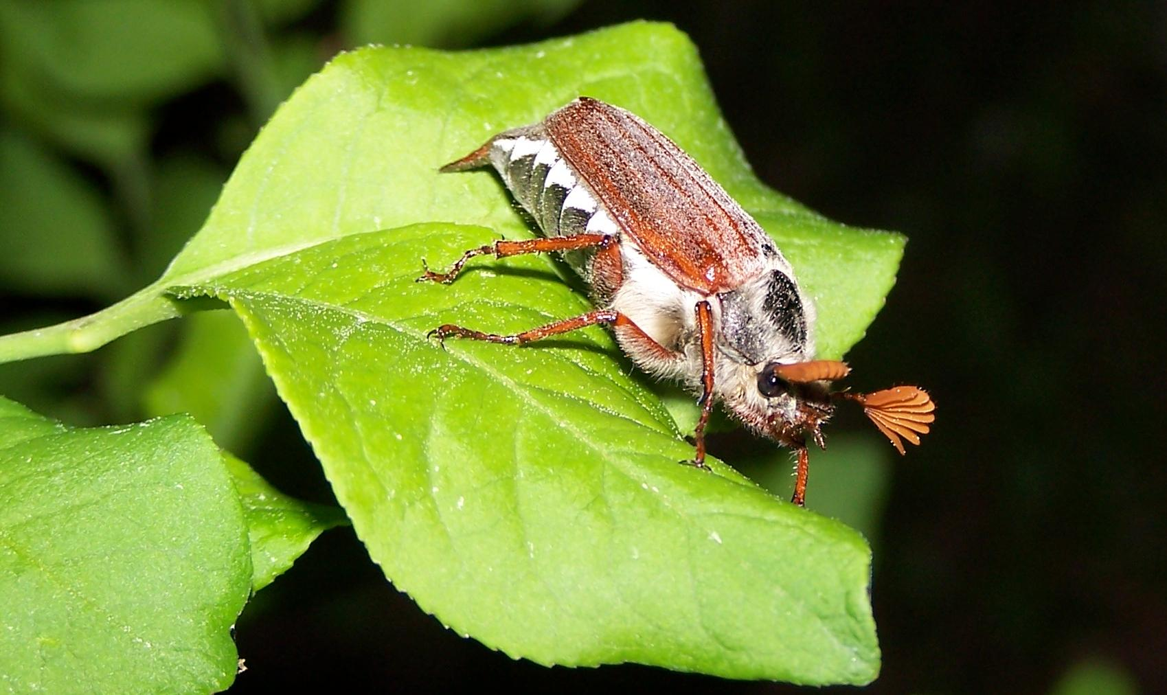 Maikäfer (wahrscheinlich Feldmaikäfer, Melolontha melolontha L.)